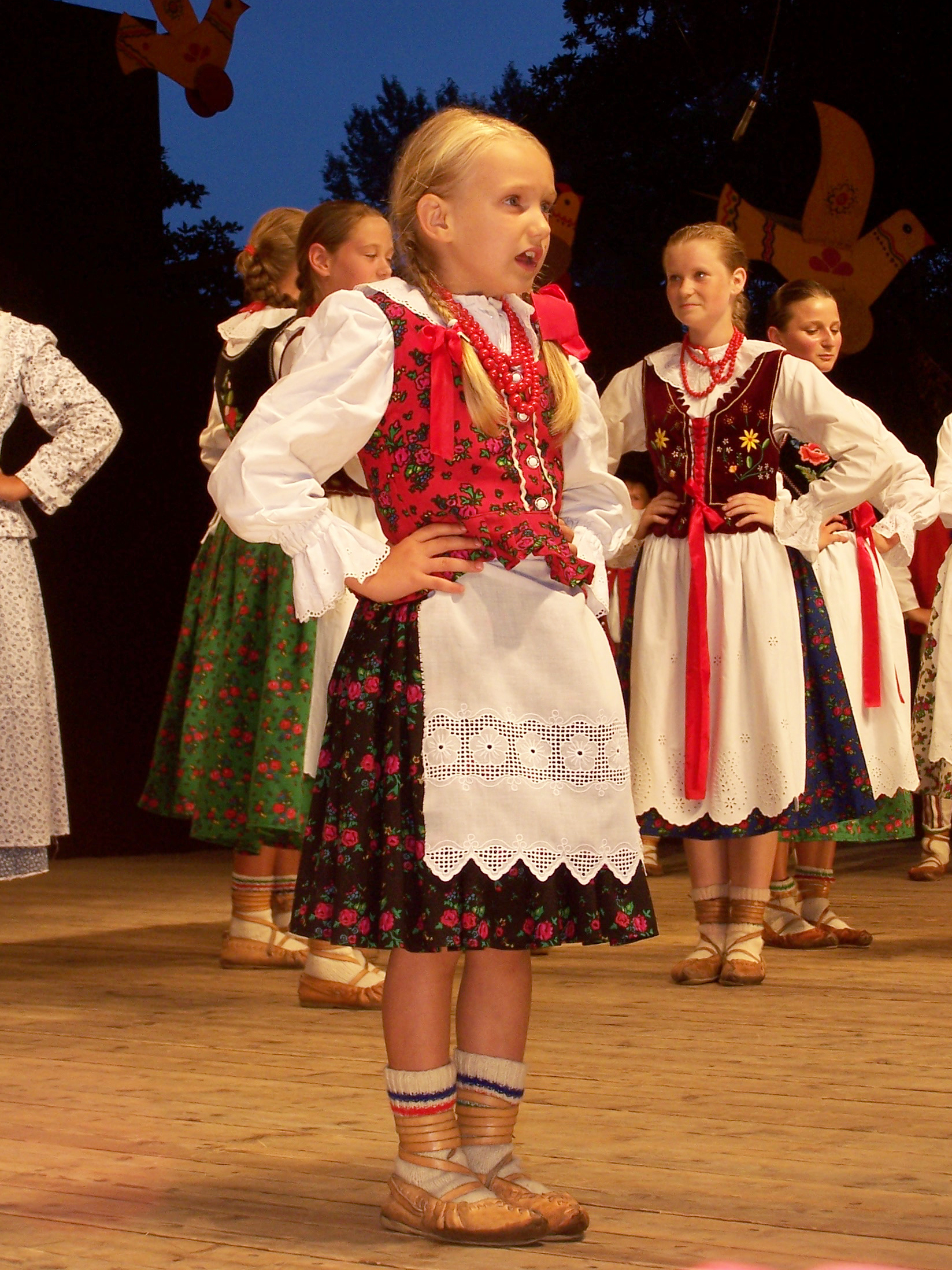 Występ zespołu Żywczanie z Żywca podczas 43. Tygodnia Kultury Beskidzkiej w Żywcu.